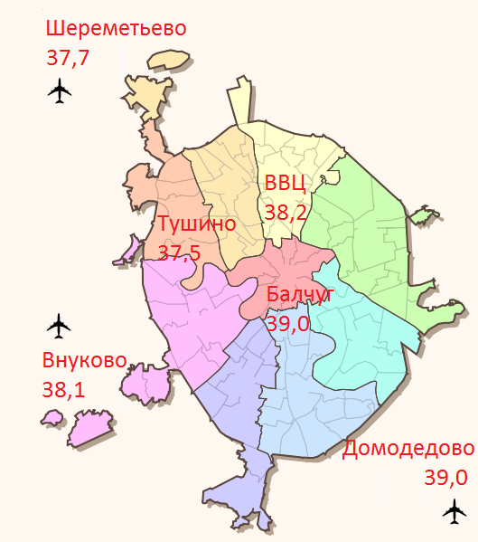 Максимальная температура по метеостанциям москвы в ходе волны жары-2010